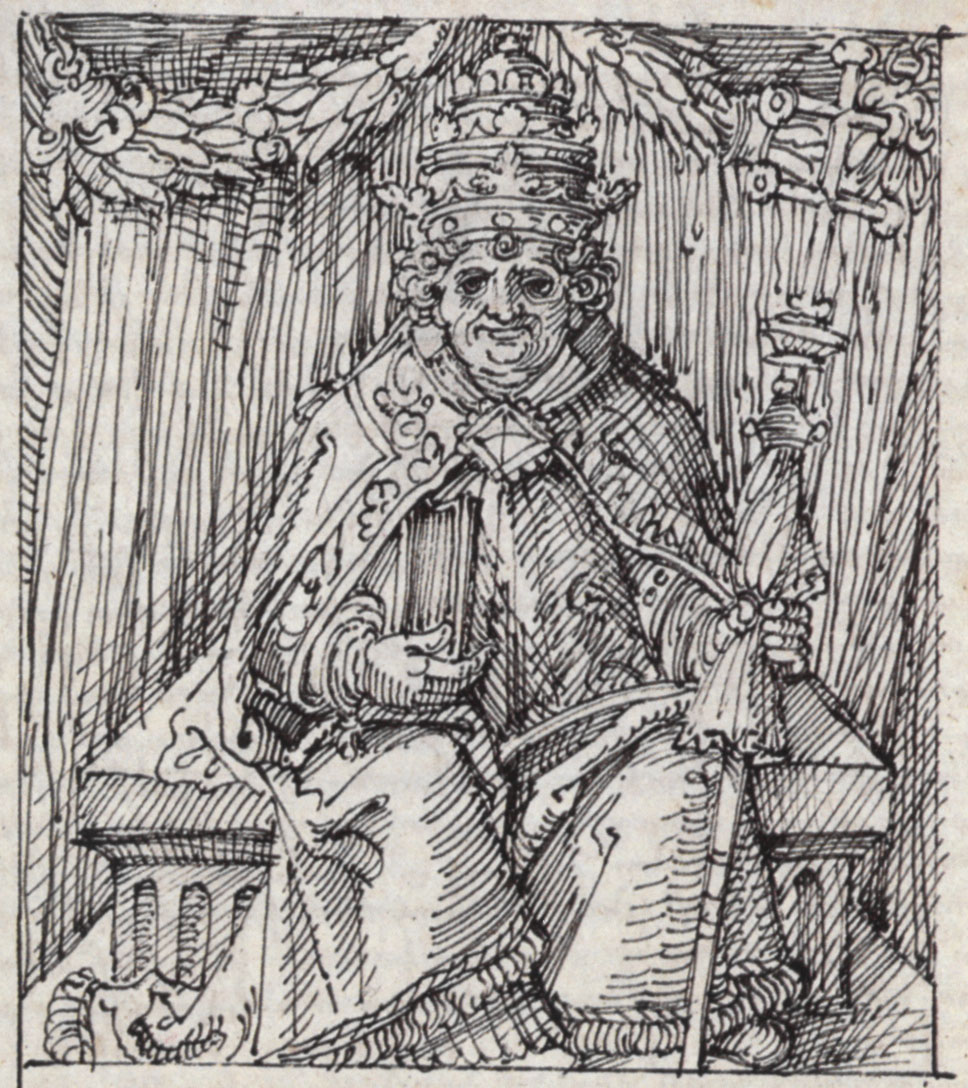 Papst Johannes IV. (?), Seite aus: Thomas Murner: Marci Antonii Sabellici History von anbeschaffener Welt, Schlettstadt 1534/1535, Autograph Murners mit wohl eigenhändiger Illustration Badische Landesbibliothek, Cod. Karlsruhe 3117